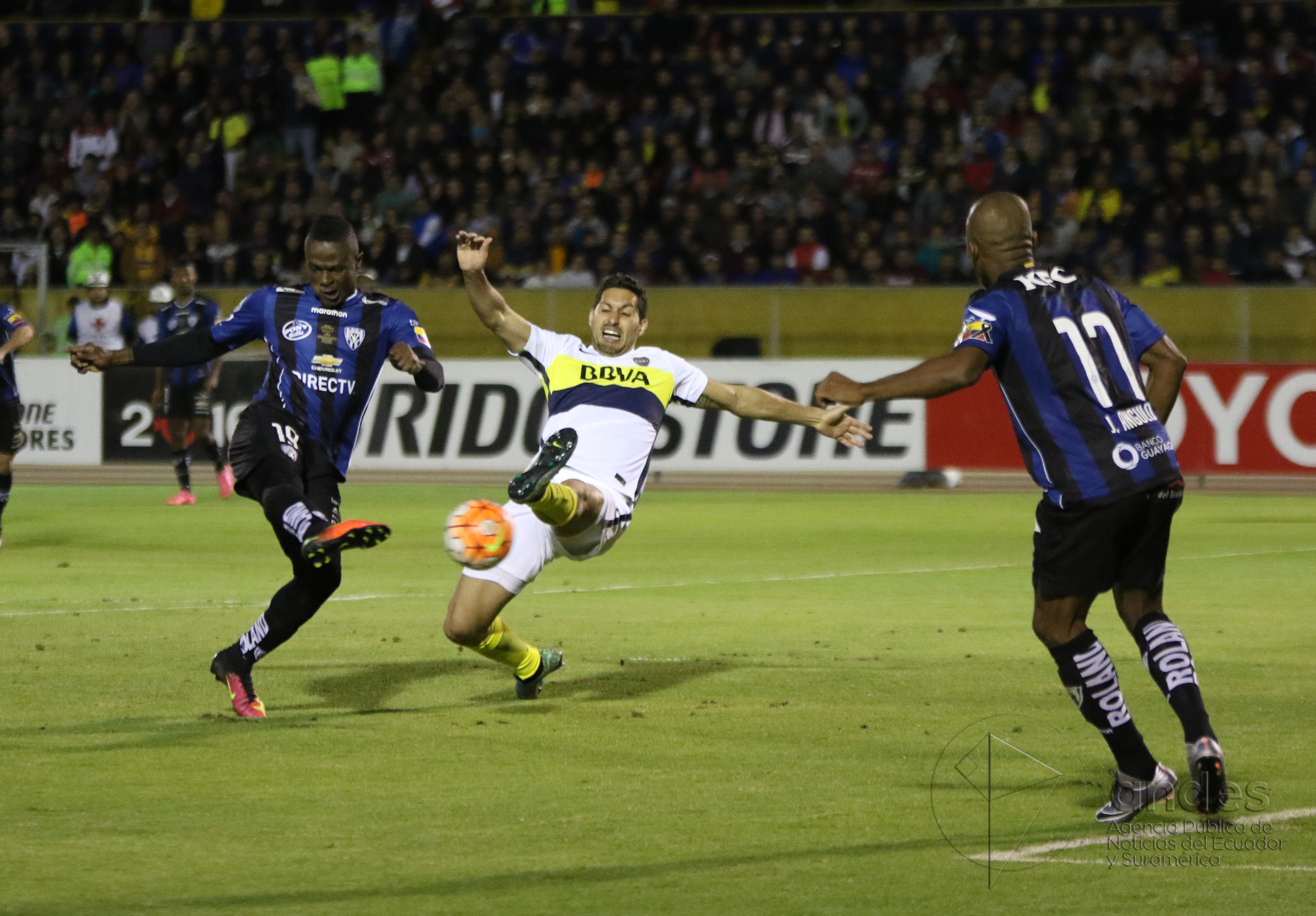 Quito, 07 jul (Andes).- Independiente del Valle vence a Boca Juniors de Argentina, por 2 tantos a 1 y mantiene abierta la serie de semifinales en Copa Libertadores. ANDES/Micaela Ayala V.